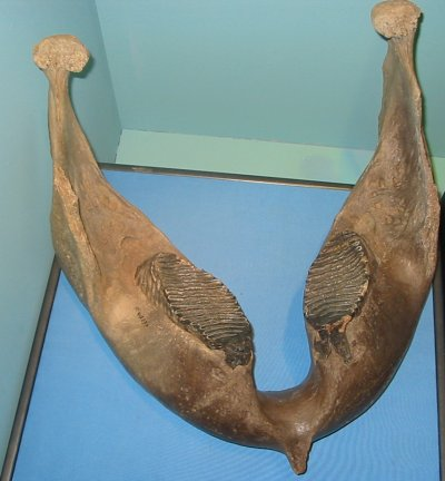 Mammoettand, Museum Boerhave, Leiden